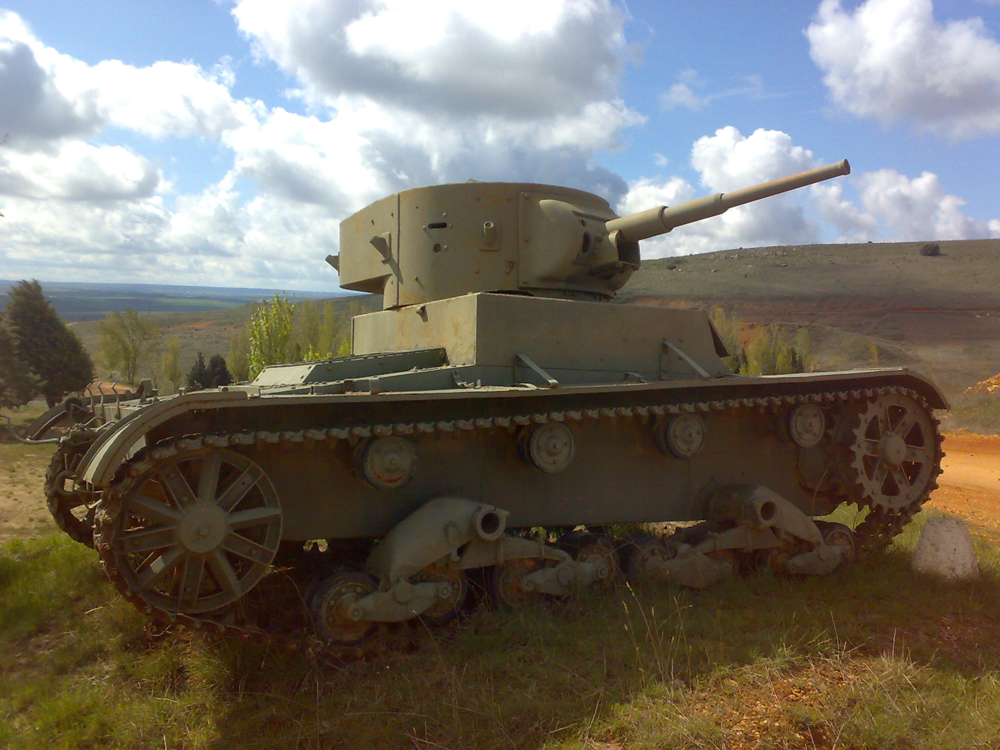 Carro de combate del modelo sovietico T-26, usado por el Gobierno de la Republica en la Guerra Civil Española. Actualmente en Salamanca.